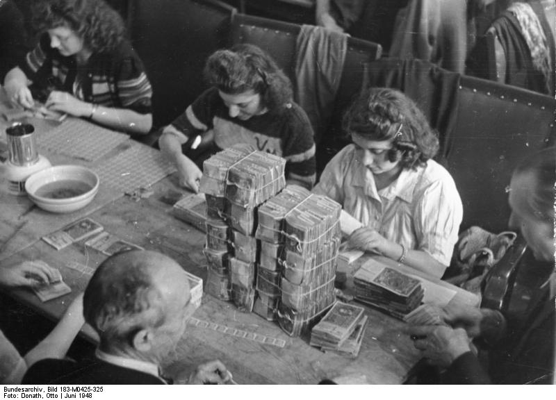 ADN-ZB-Donath Nach der separaten Währungsreform am 18.6.1948 in den Westzonen und im Westsektor Berlins, die einen entscheidenden Schritt zur Spaltung Westdeutschlands bildet, wird am 23. Juni die Währungsreform für die sowjetische Besatzungszone und den sowjetischen Sektor Berlins beschlossen. UBz: In einem Saal der Deutschen Wirtschaftskommission in Berlin, Leipziger Straße, werden auf die bisherigen Geldscheine Kupons aufgeklebt, um ein gültiges Zahlungsmittel für die Bürger im sowjetischen Sektor Berlins zu erhalten. Juni 1948